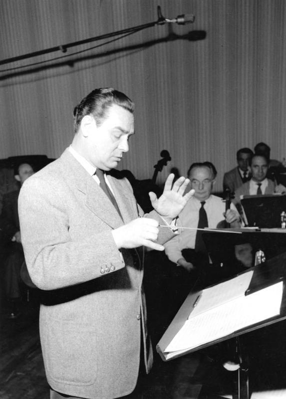 Funkhaus Köln: Adalbert Luczkowski, Leiter des bekannten Unterhaltungs- und Tanzorchester im Funkhaus Köln.